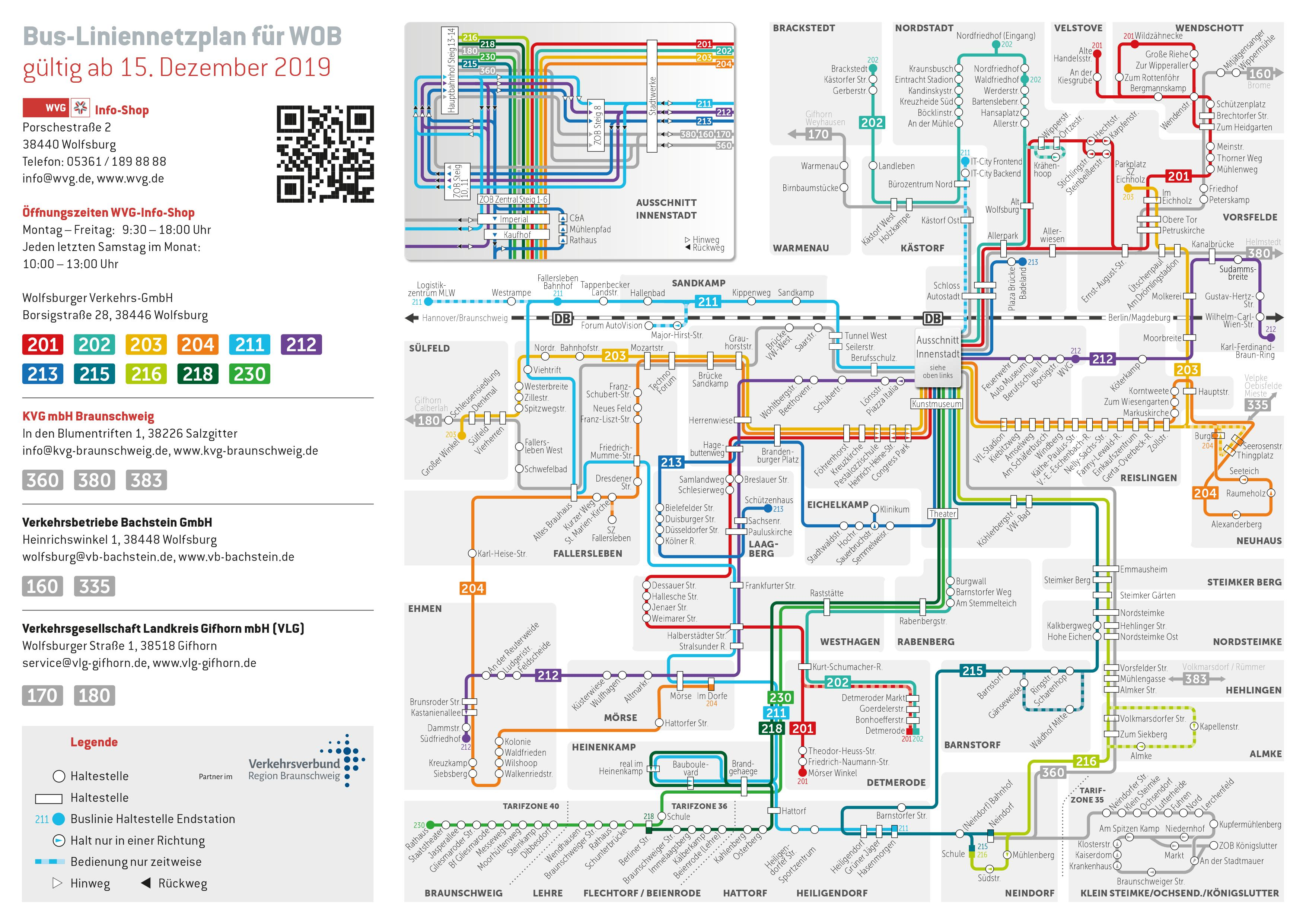 Gesamtliniennetzplan der WVG - Stand: Dez.2019